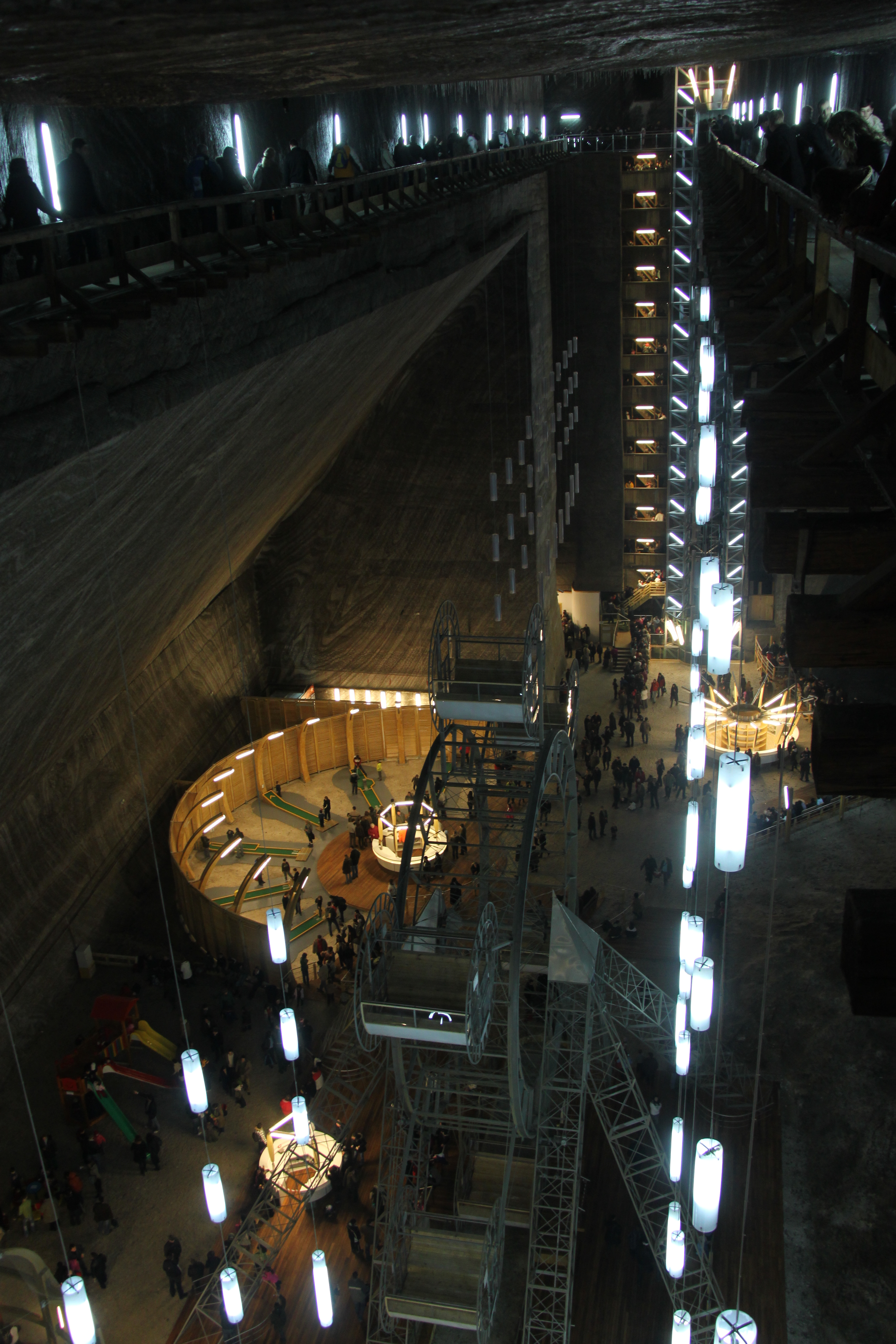 Salina Turda, mina Rudolf